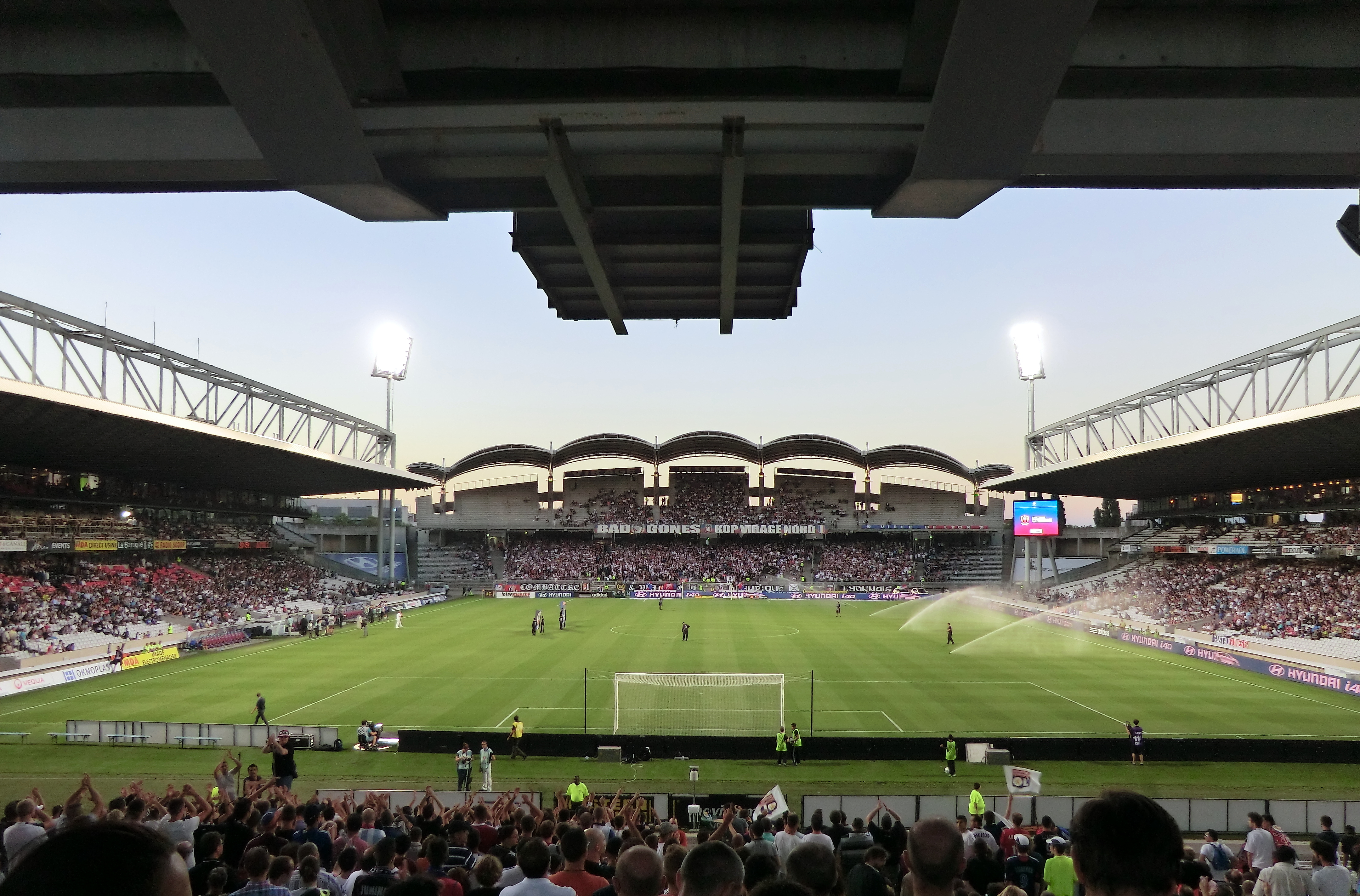 Première journée de championnat : Olympique Lyonnais - OGC Nice à Gerland (4 à 0). Lisandro Lopez partant du club a fait un discours à la mi-temps et a reçu un présent remis par Bernard Lacombe.